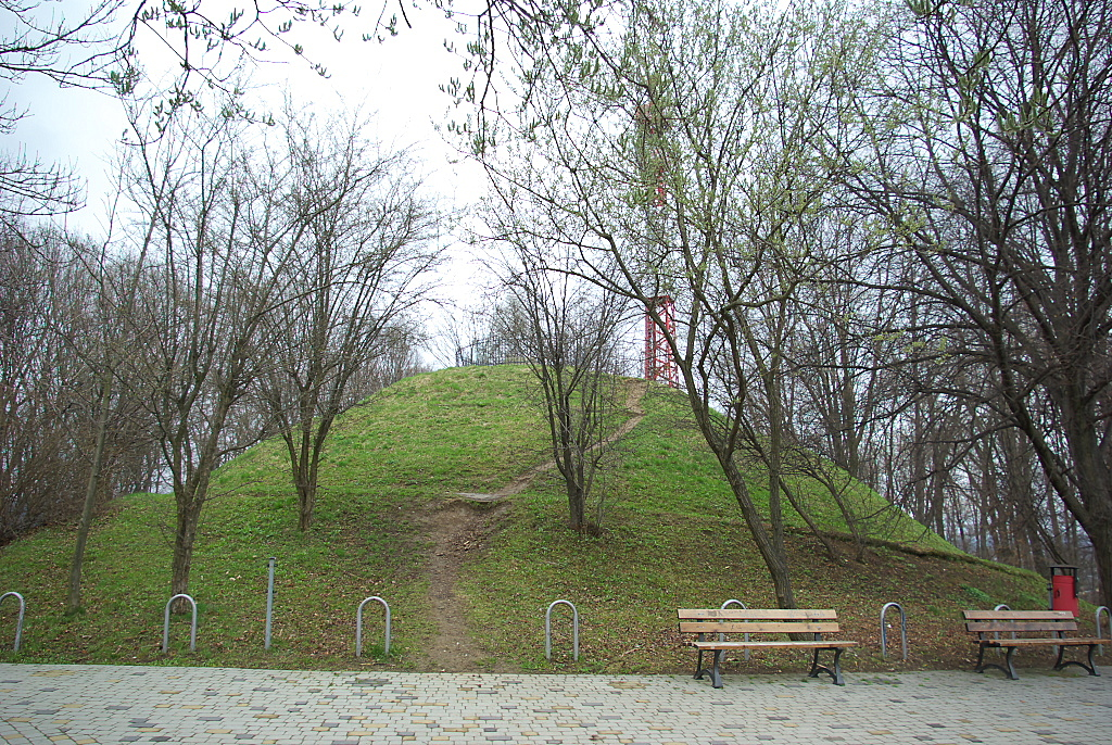 Kopiec Mickiewicza park Sanok